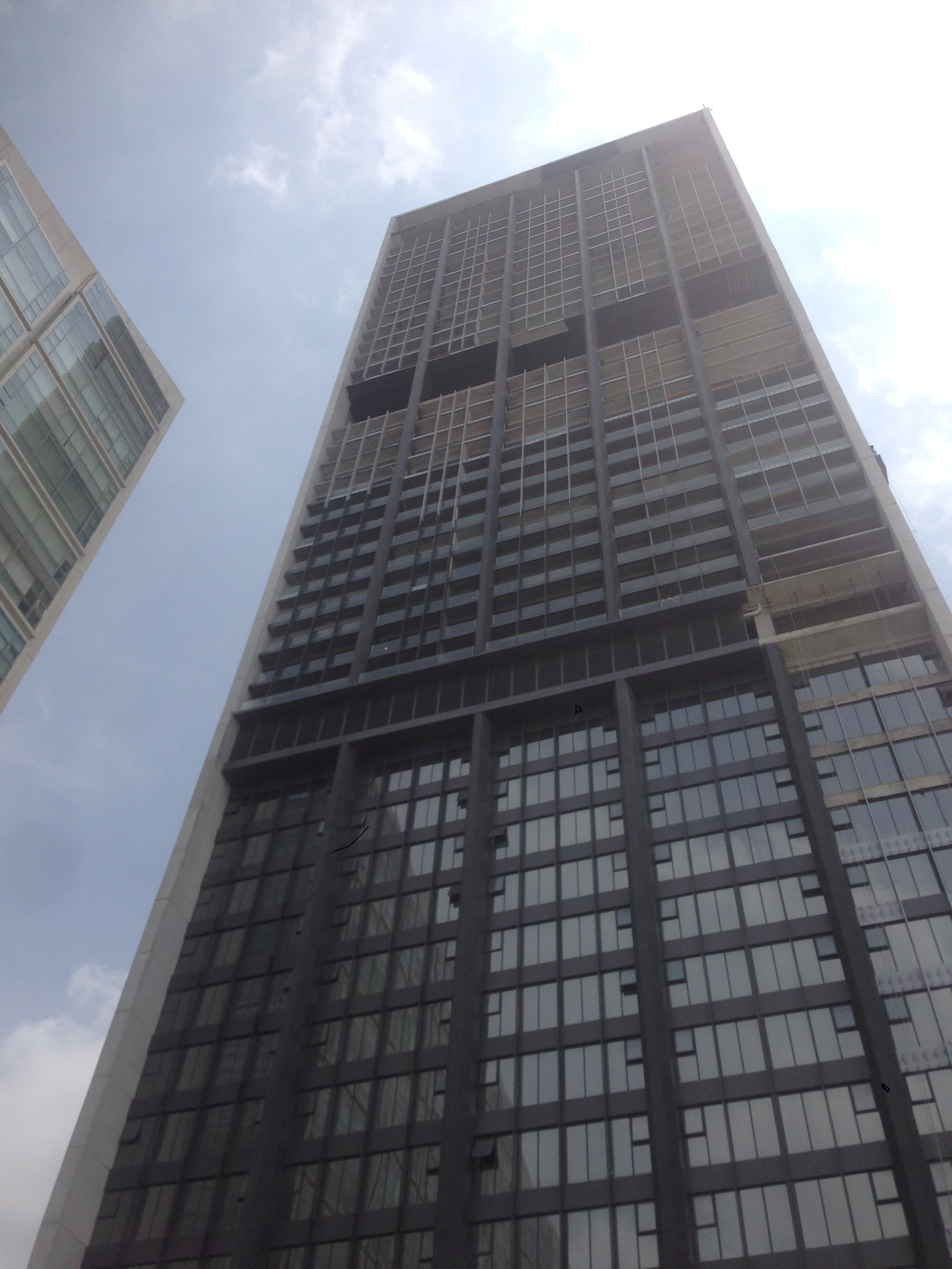 Zapopan, Jalisco, Mexico